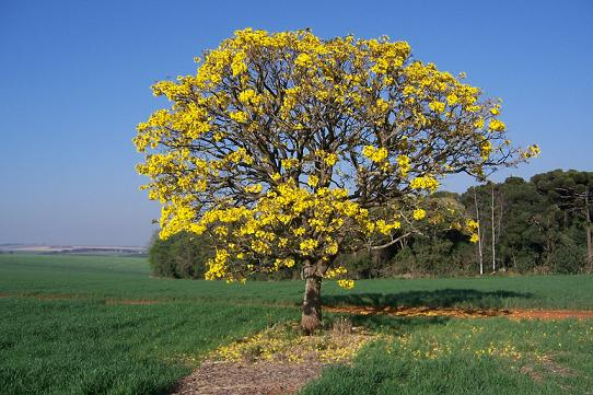 Kvetoucí strom